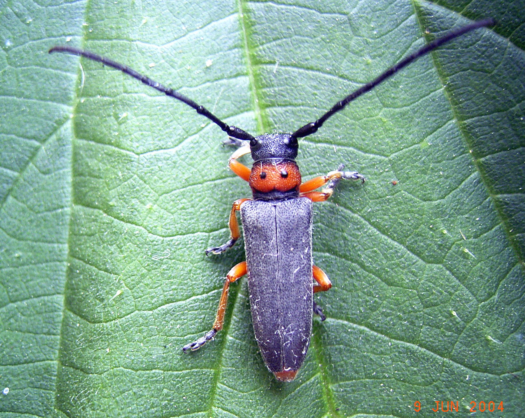 Phytoecia affinis (synonym Phytocea nigripes)